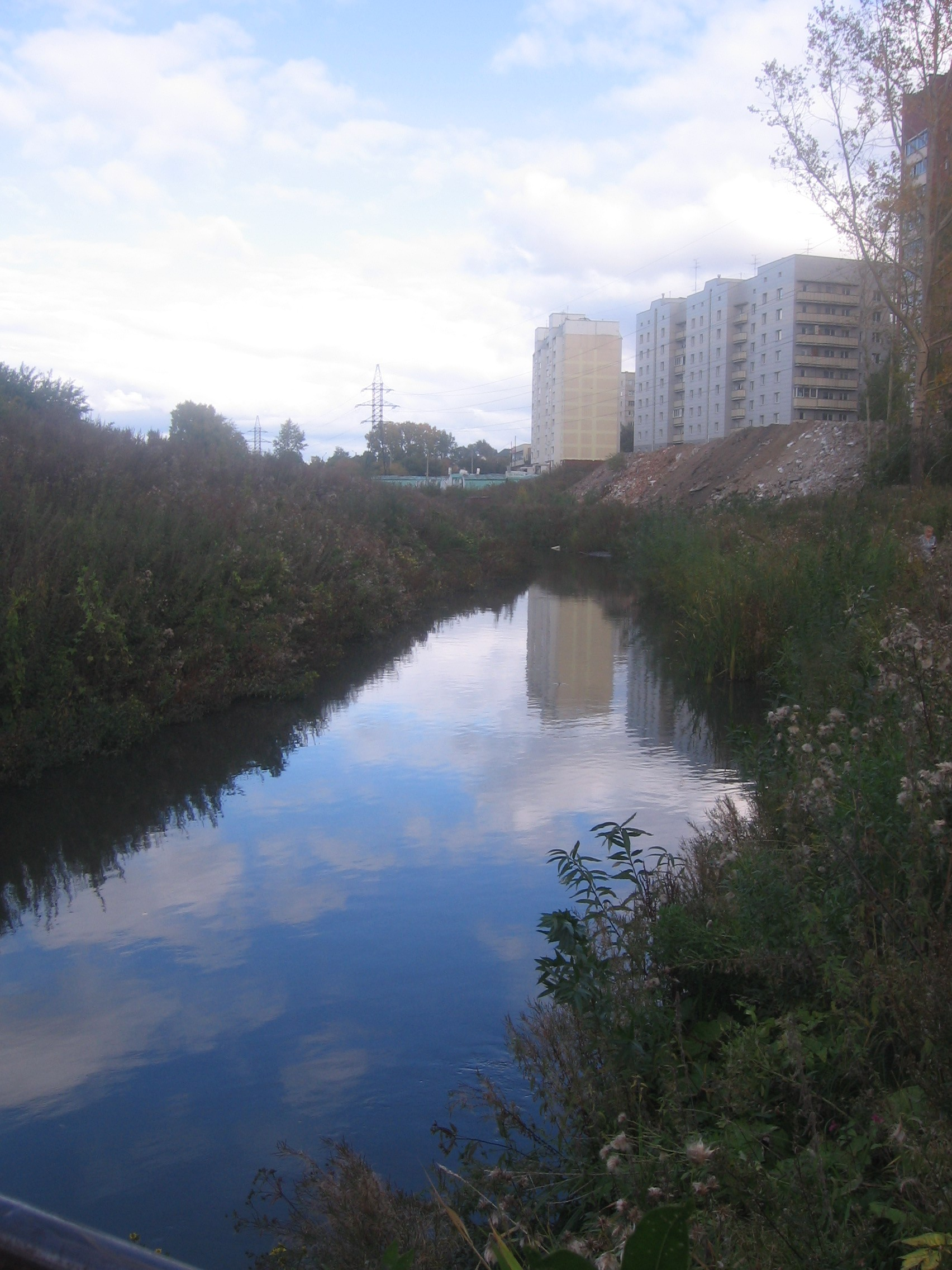 Один из не многих не засыпанных участков реки Каменки (нижний приток Оби) на территории города Новосибирска. Фото с моста возле дома по адресу ул.Есенина, 10/2